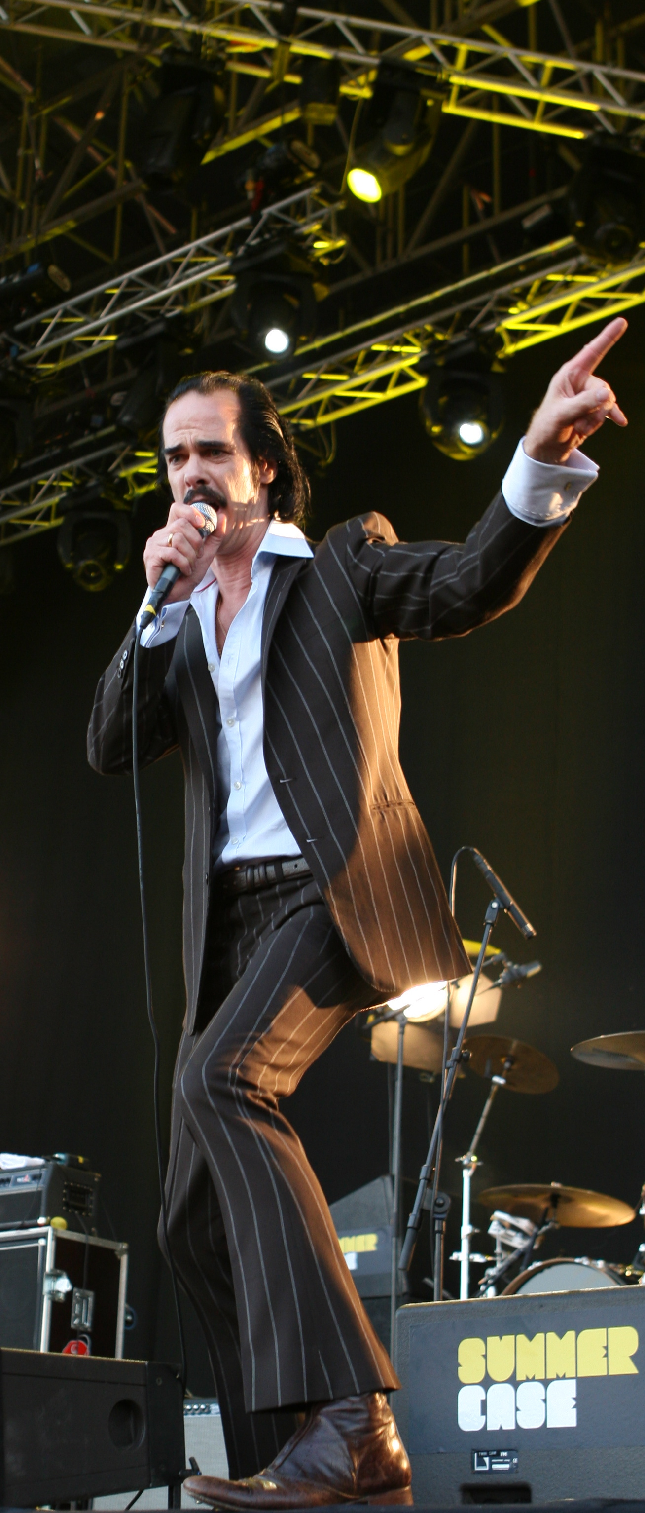 Nick Cave / Grinderman en el Summercase 08 de Barcelona